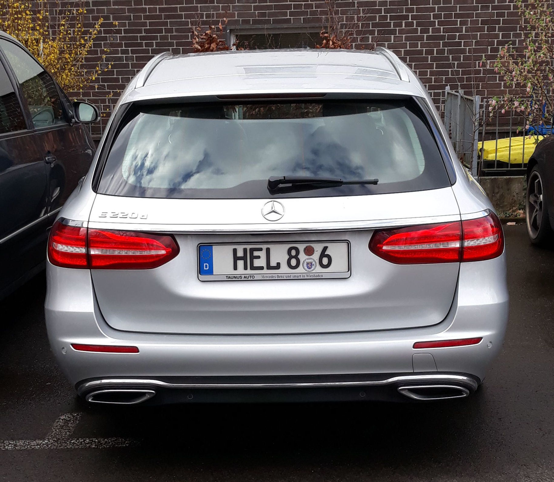 Personenkraftwagen (Mercedes E 220 D) mit Behördenkennzeichen Hessen (hier: Kultusministerium).